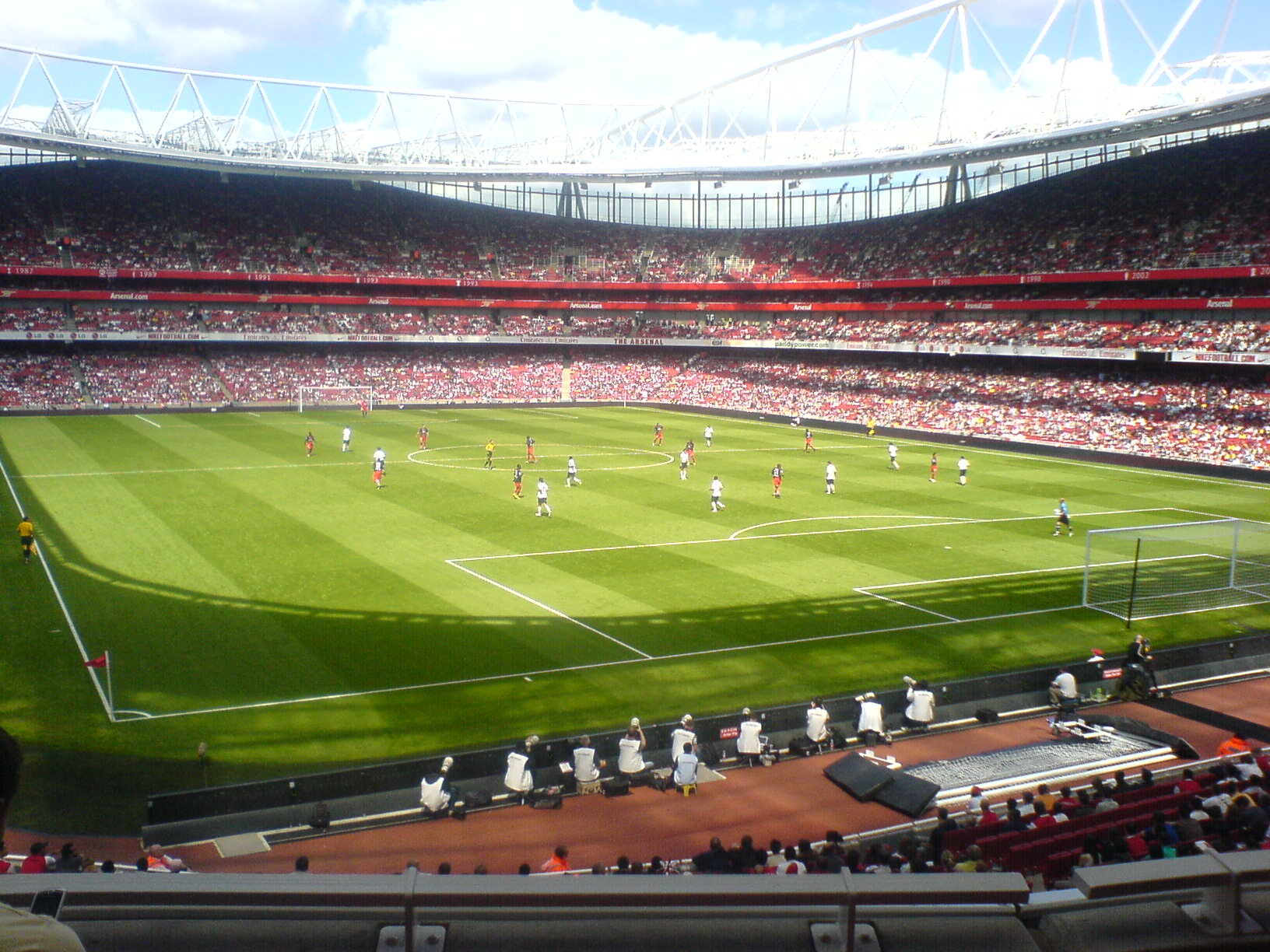 Lisans